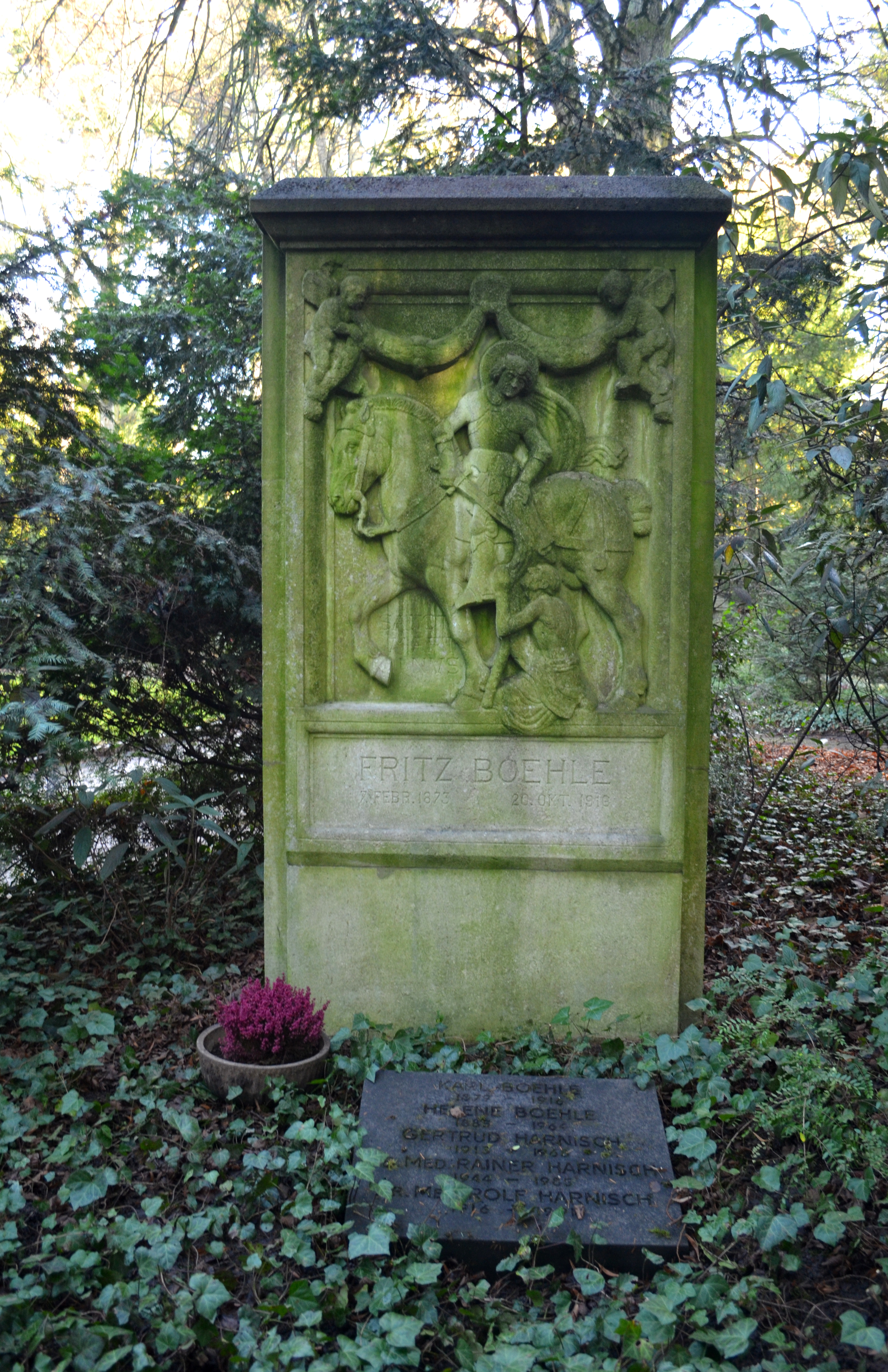 Frankfurt, Hauptfriedhof, Grab XII 1 Fritz Böhle (07.02.1875-20.10.1916)